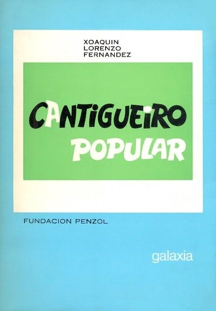 Cantigueiro popular.